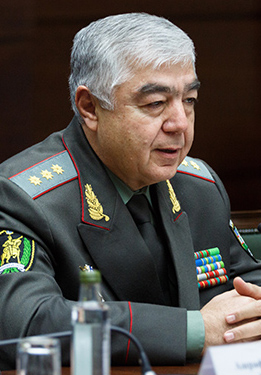 Министр обороны Ревпублики Узбекистан генерал-полковник Кабул Бердиев